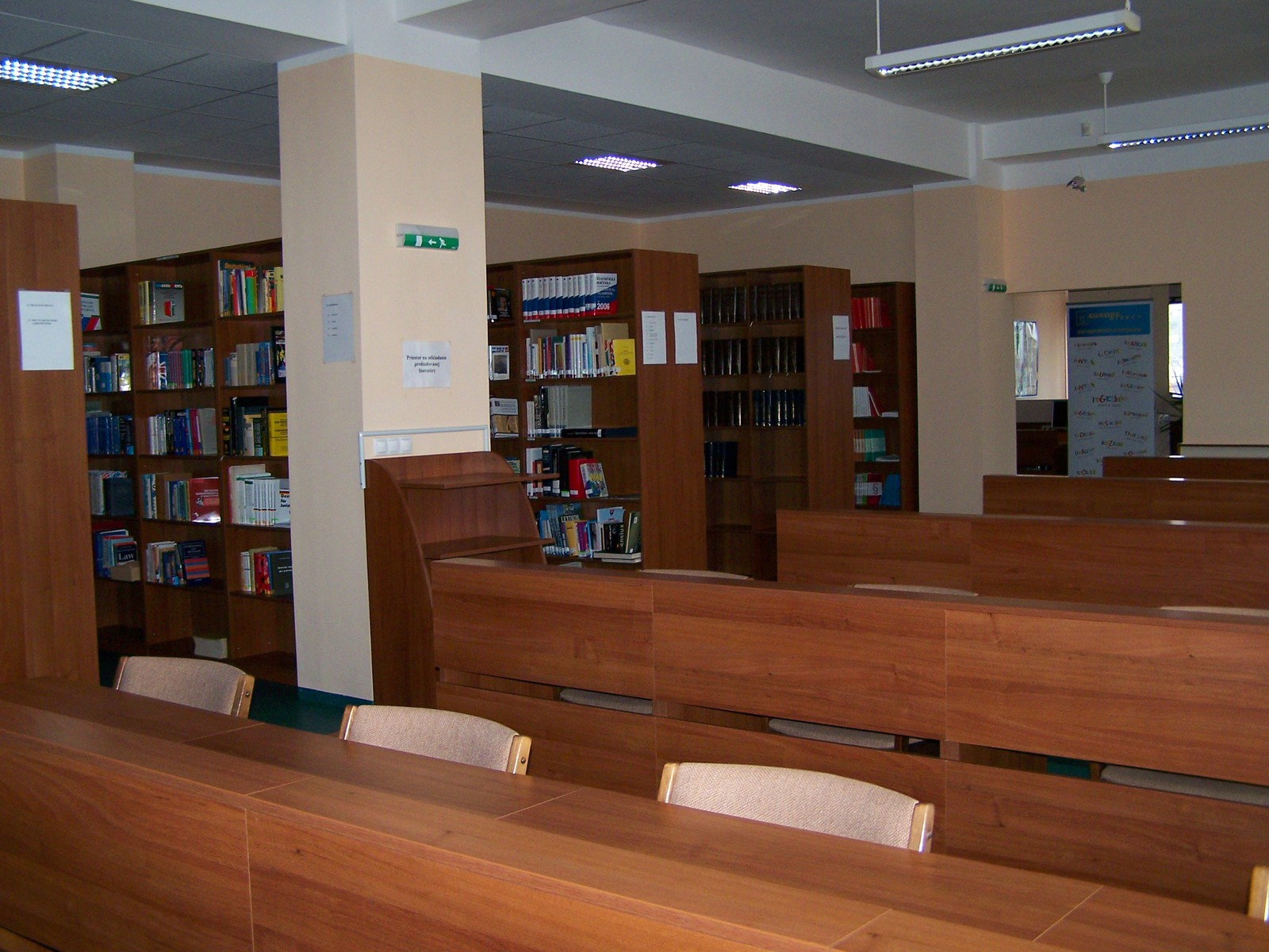 Knižnica Právnickej fakulty UK (výrez)